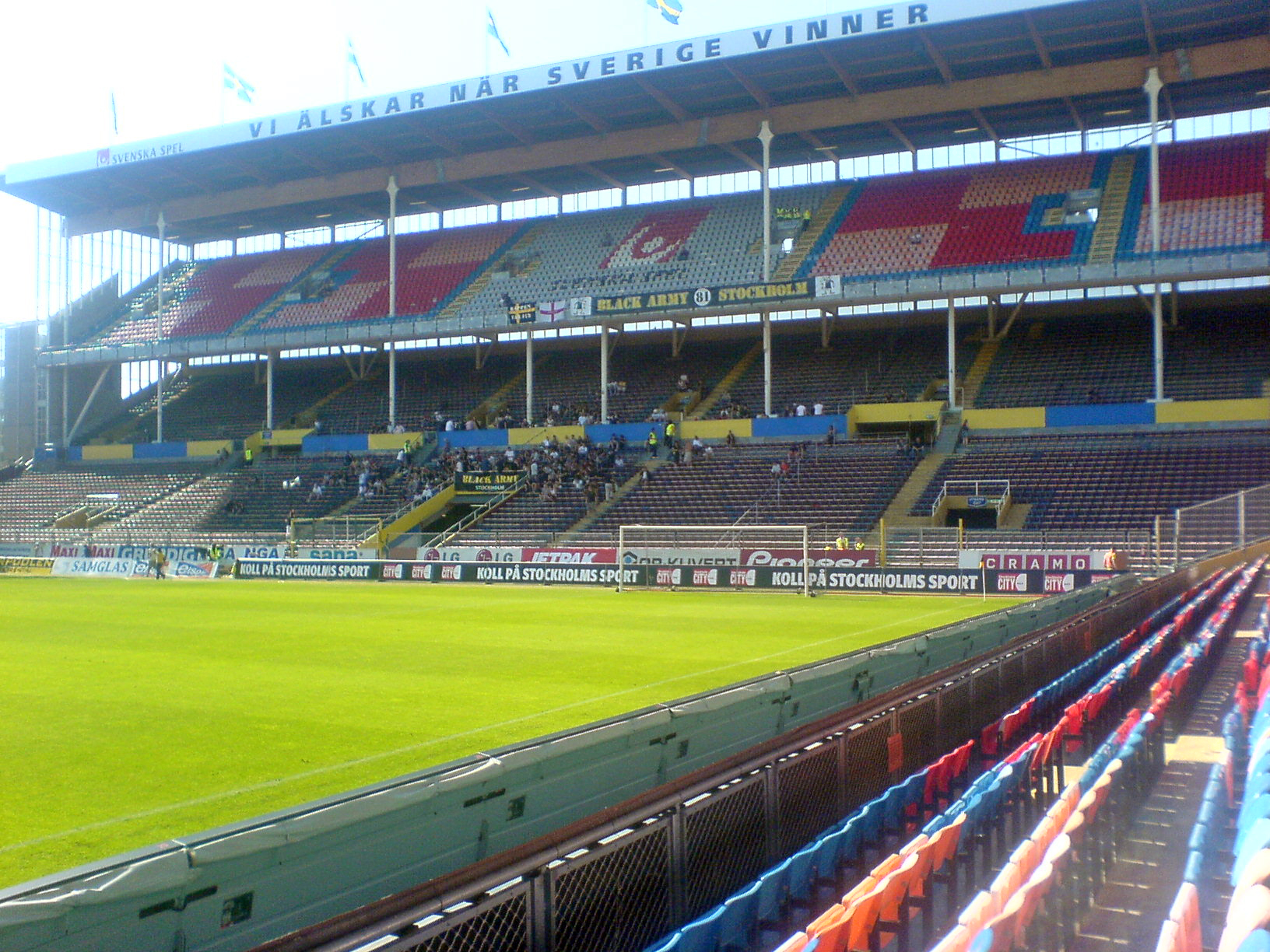 Norra Stå (Curva Nord) and Norra Övre more than one hour before the Fotbollsallsvenskan game between AIK and Örebro SK (1-1).